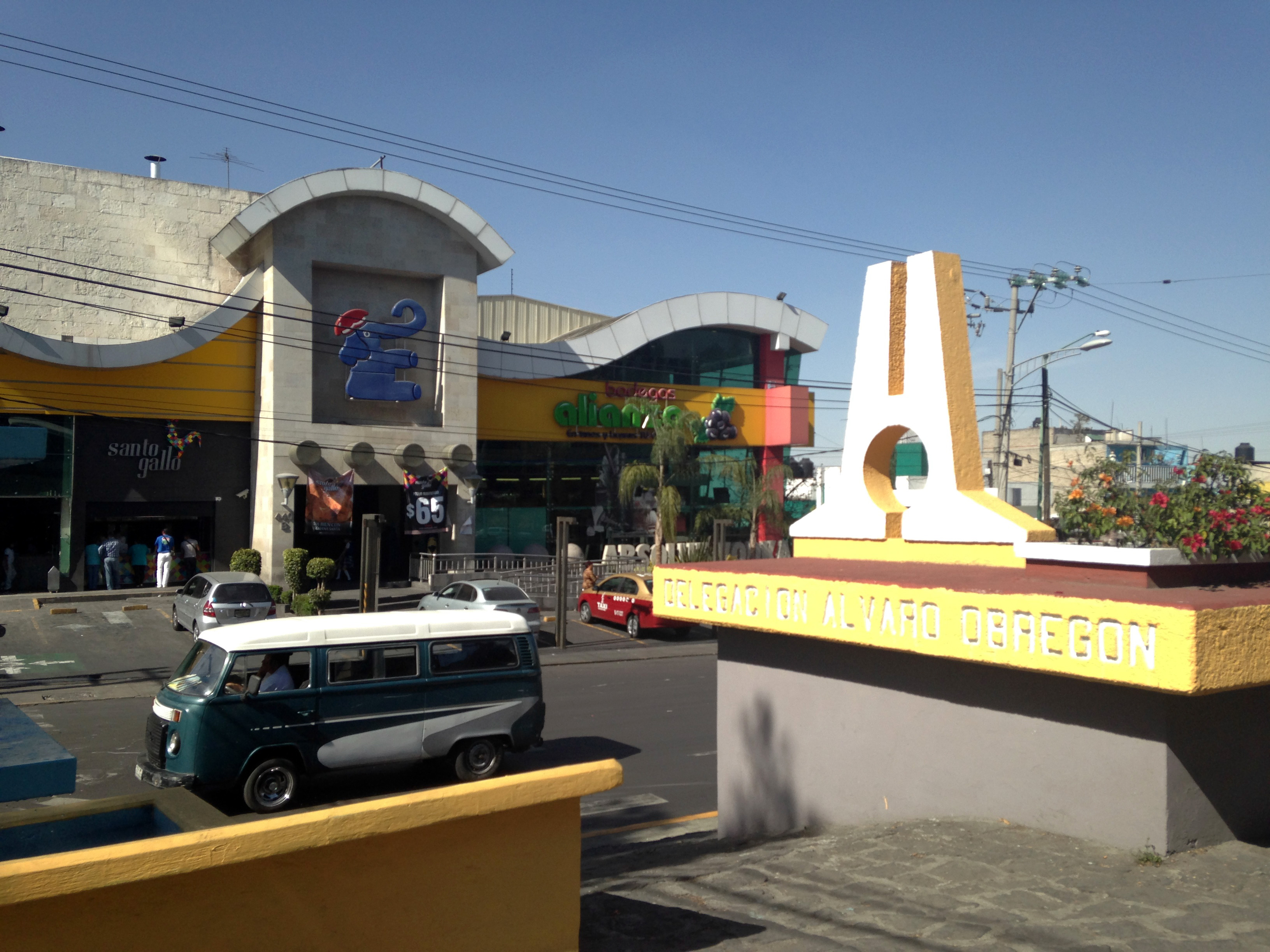 Avenida Vasco de Quiroga Delegación Alvaro Obregón, Ciudad de México